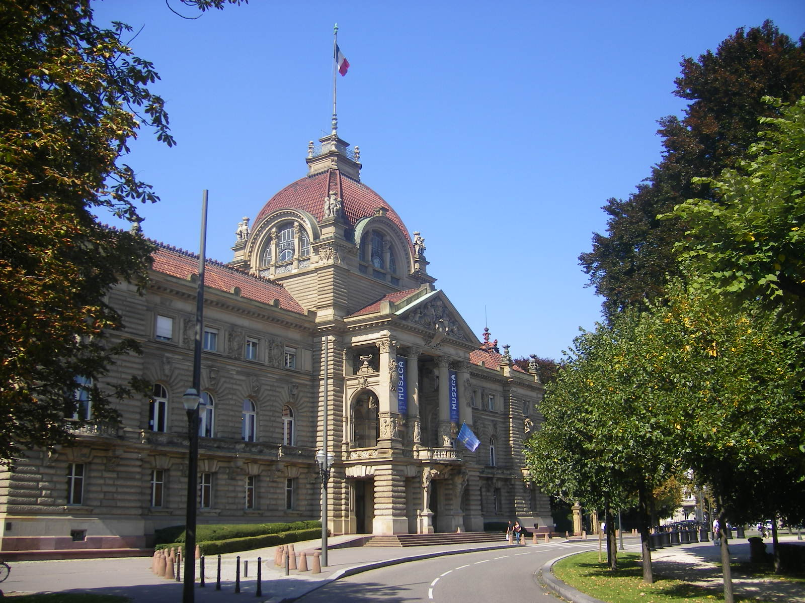 Strasbourg - Palais du Rhin